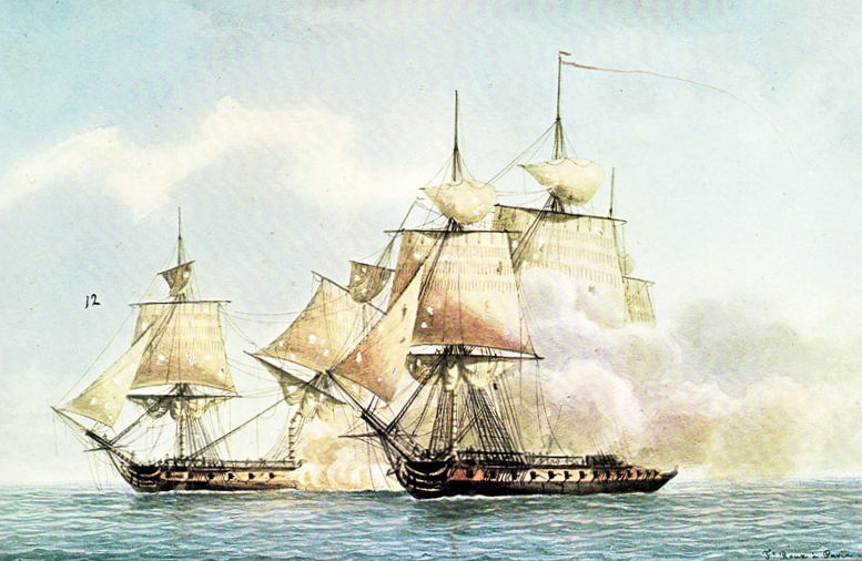 Amazone